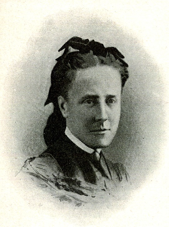 Miss Brevoort, dessin d'André Slomszynski (1844 - 1909), d'après une photographie